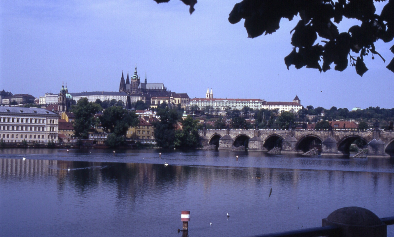 Prag Karlsbrücke 1990